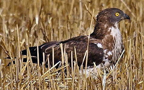 Wespenbussard beim Ausgraben eines Wespennests. Marchfeld, Österreich.